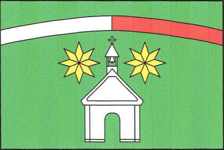 Chlumy vlajka